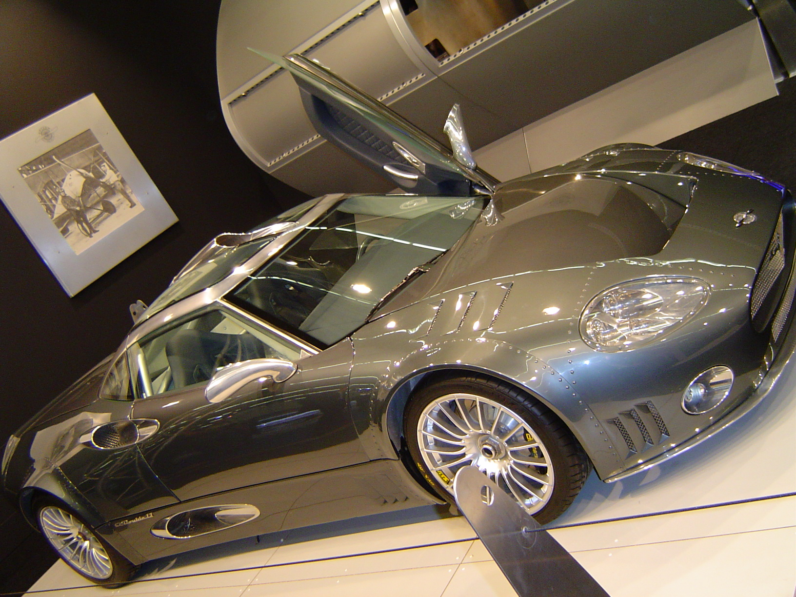 IAA_2003_082